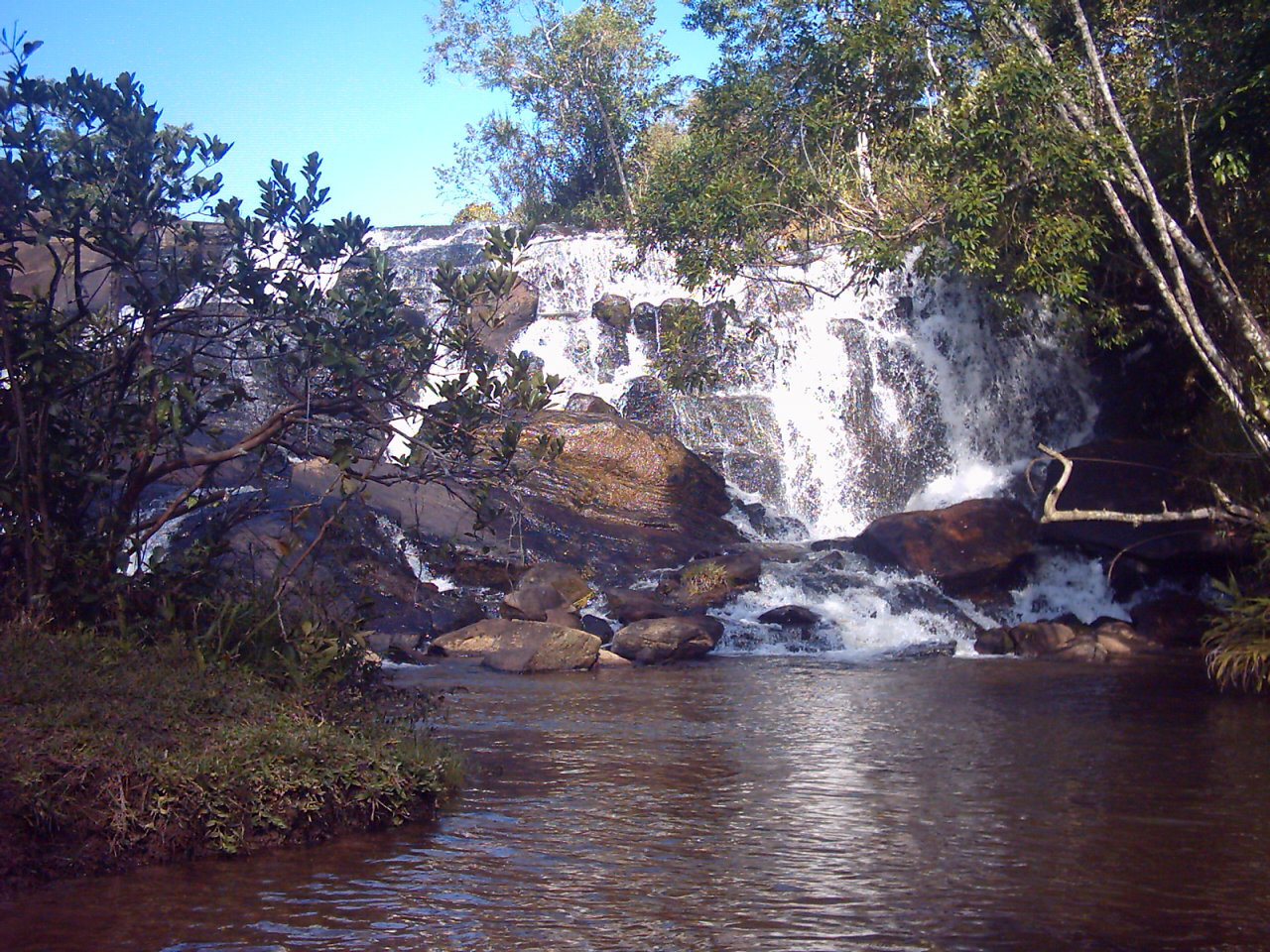 Cachoeira Pouso Alto, São Paulo